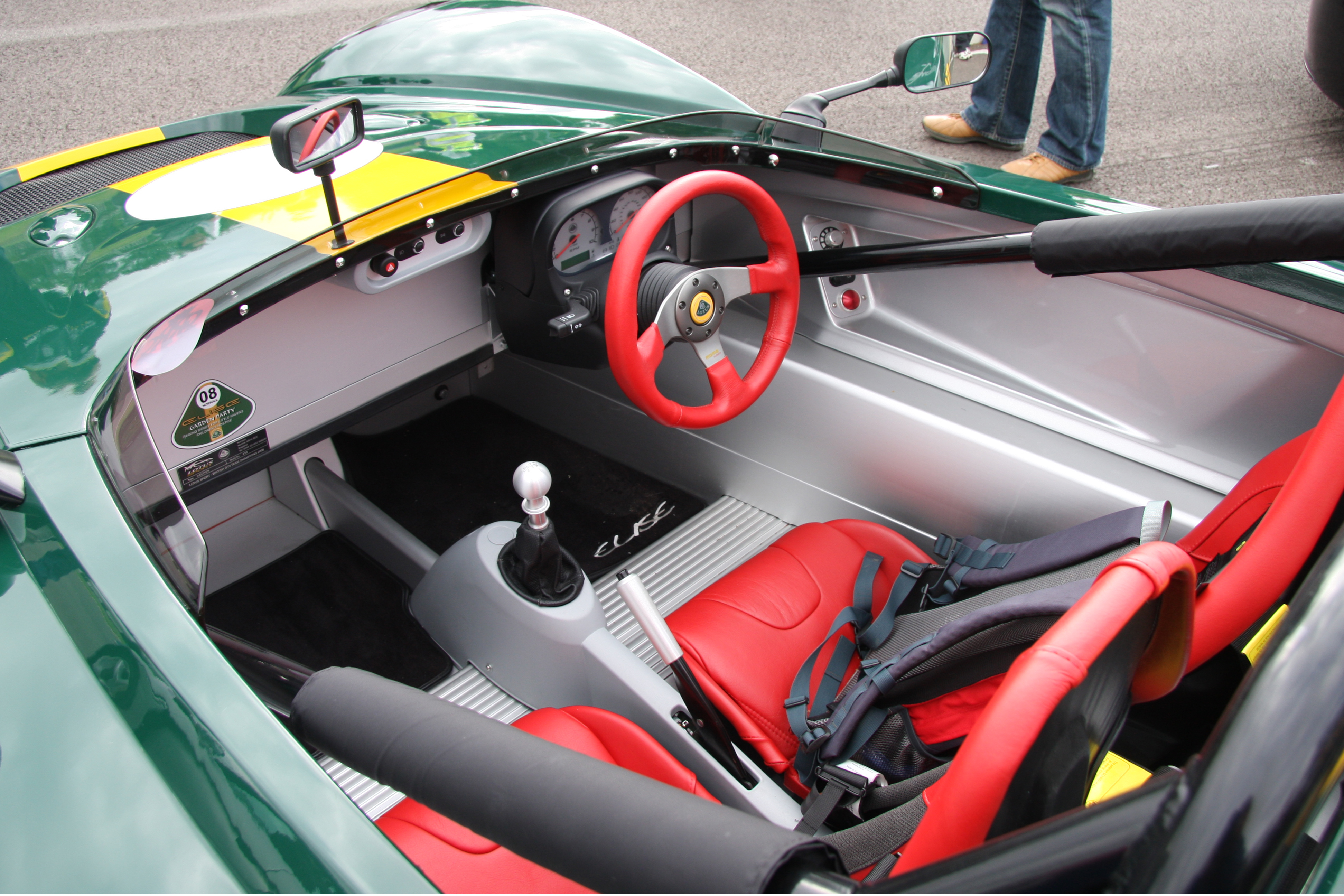 Lotus 2-Eleven interior